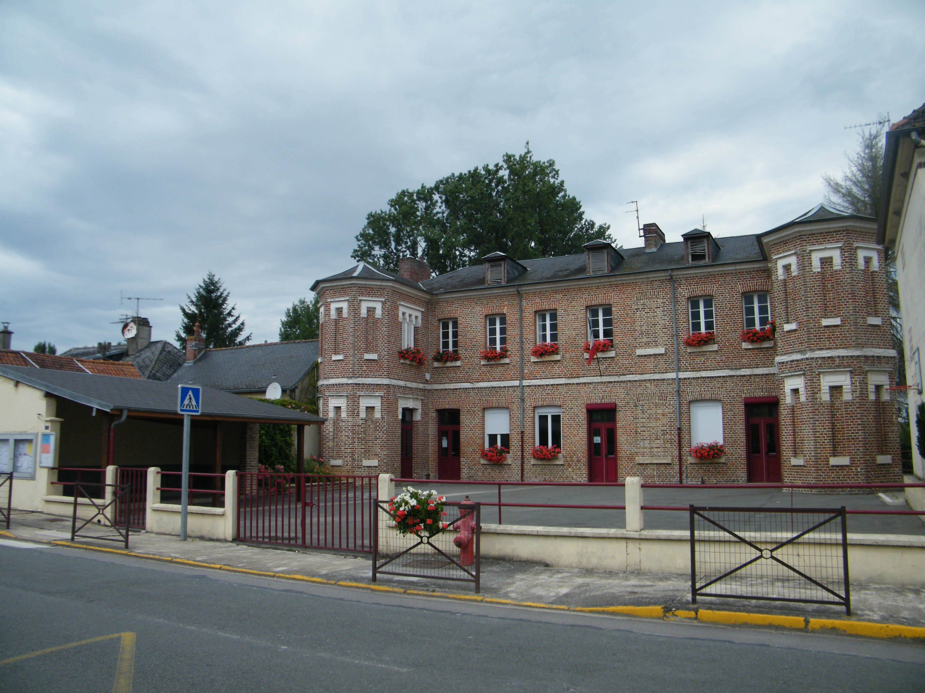 École de Condé-Folie, Somme, France.